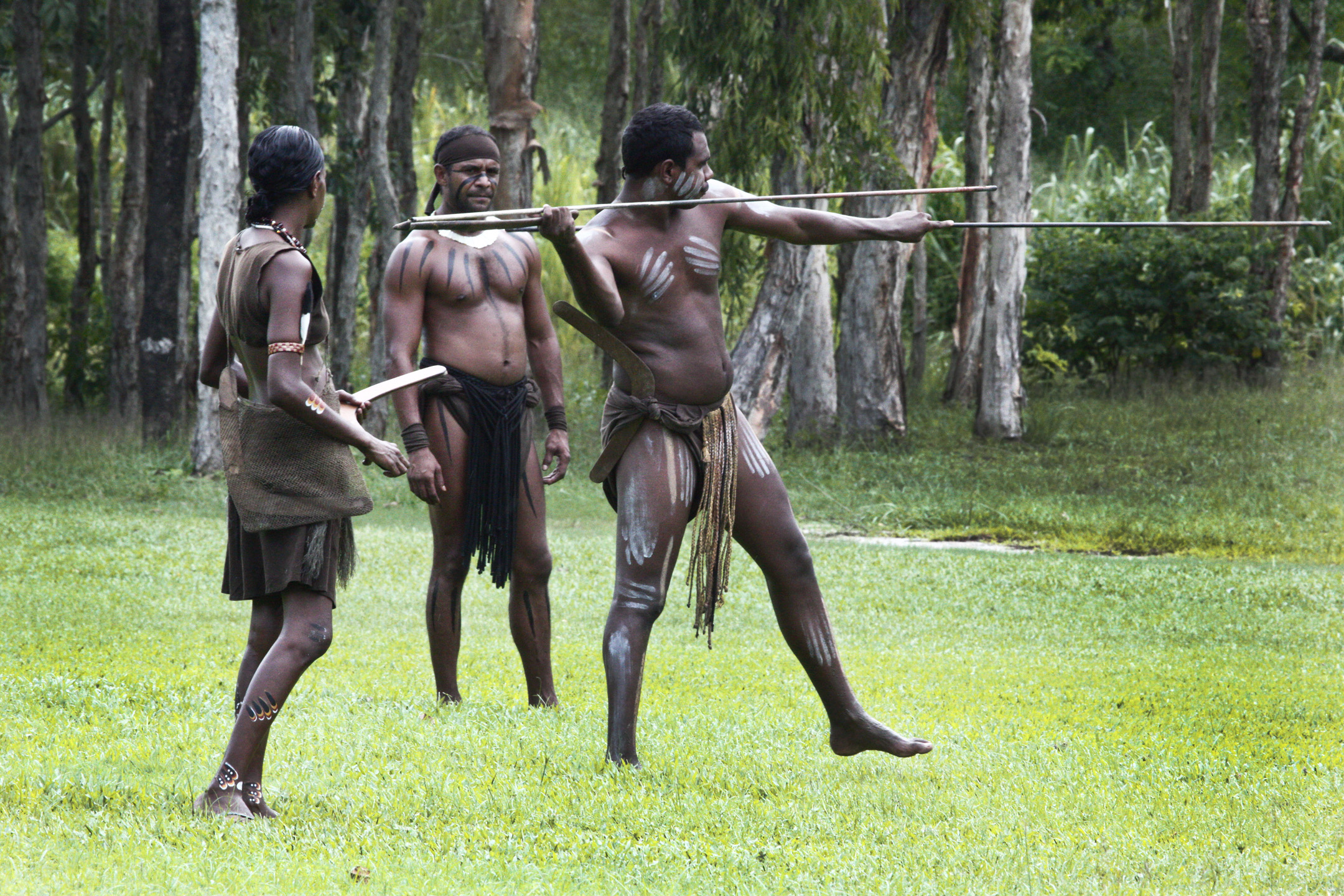 Australia: Aboriginal Culture 011